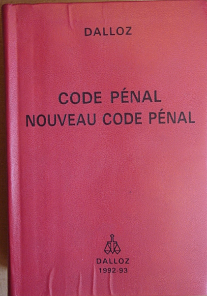 Couverture de l'édition 1993 du: Code penal et du Nouveau code penal français.